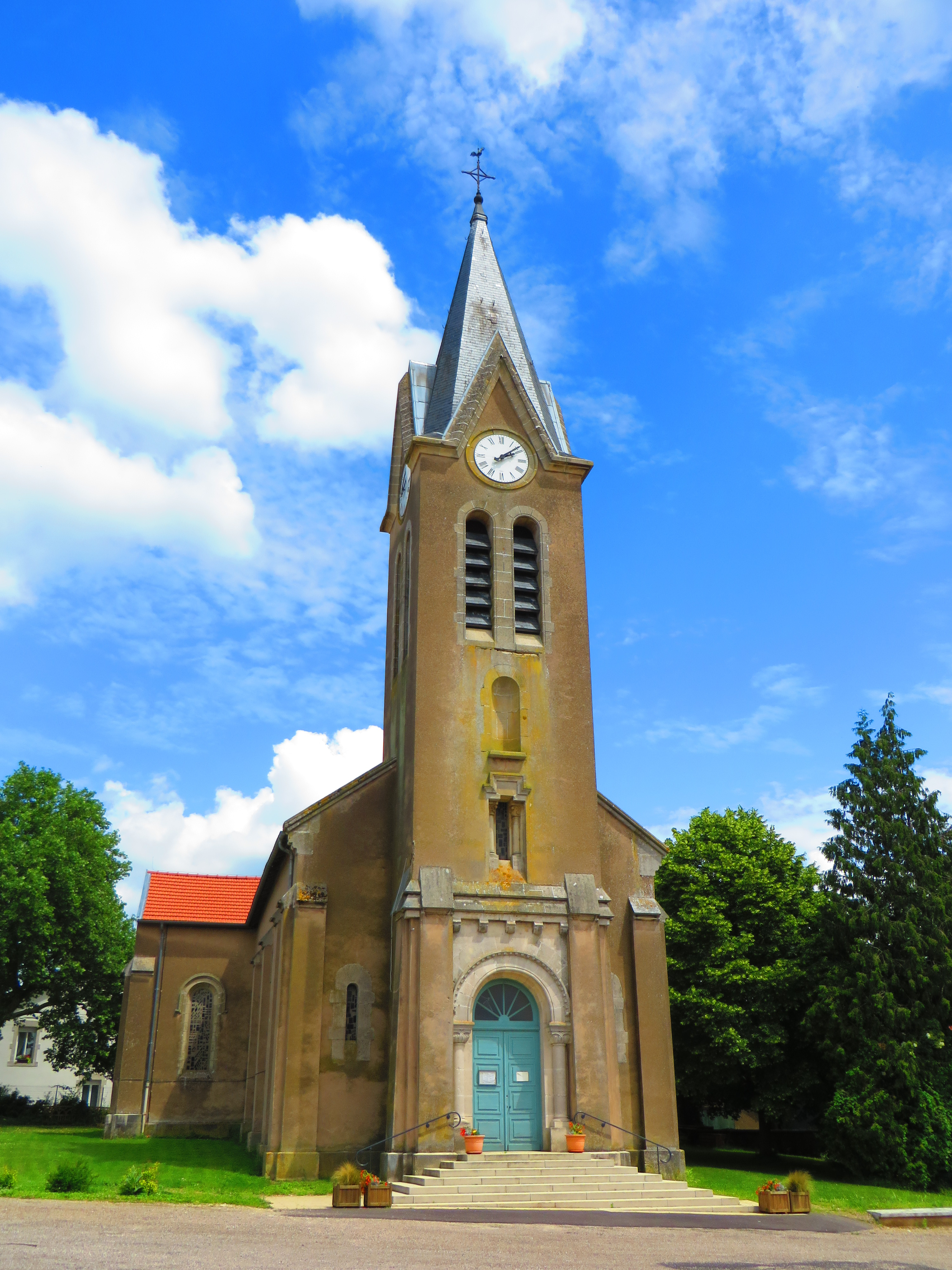 Letricourt Église Saint-Remy